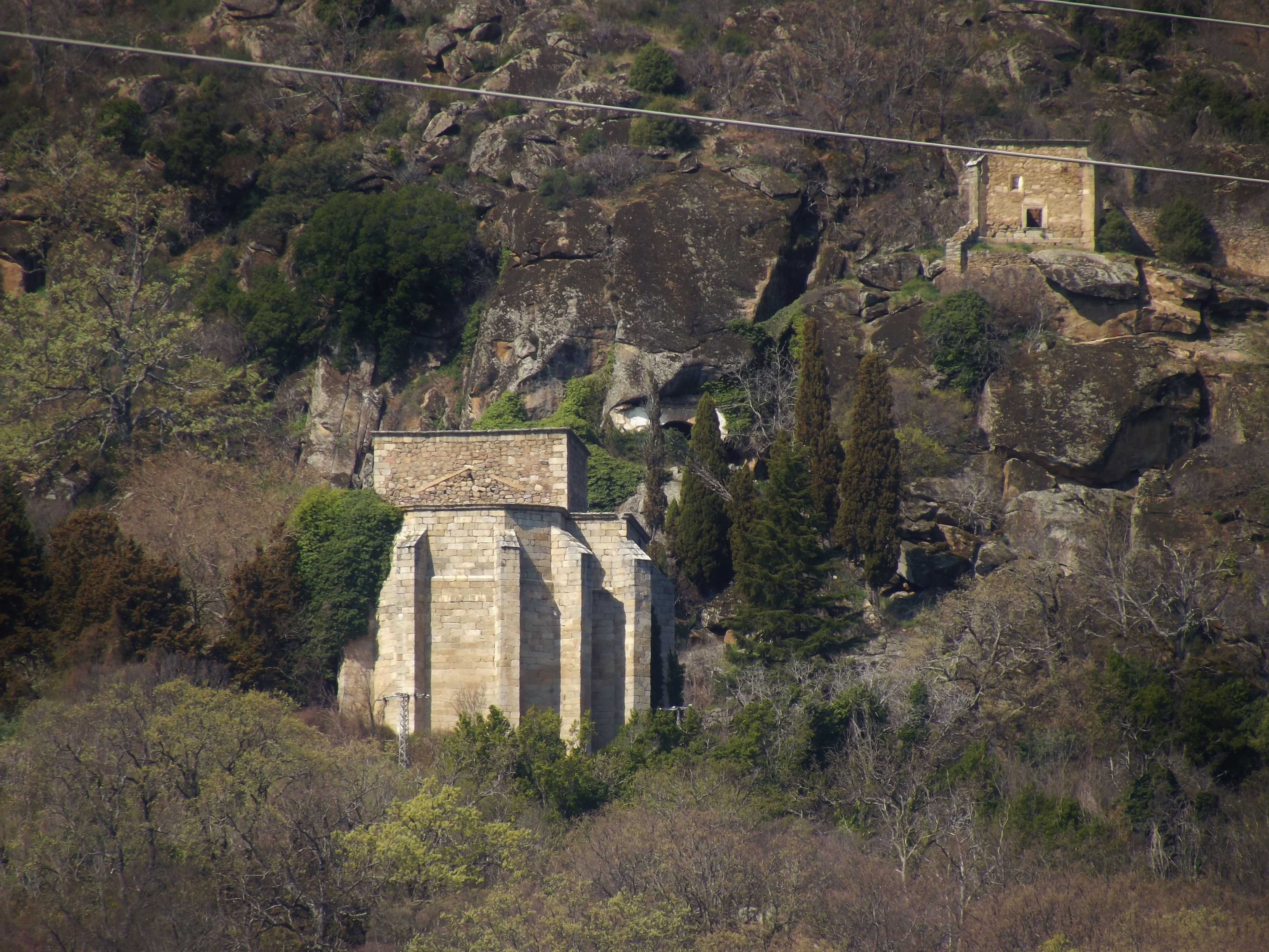 Vista del Monasterio de San Jerónimo de Guisando, El Tiemblo, Ávila.